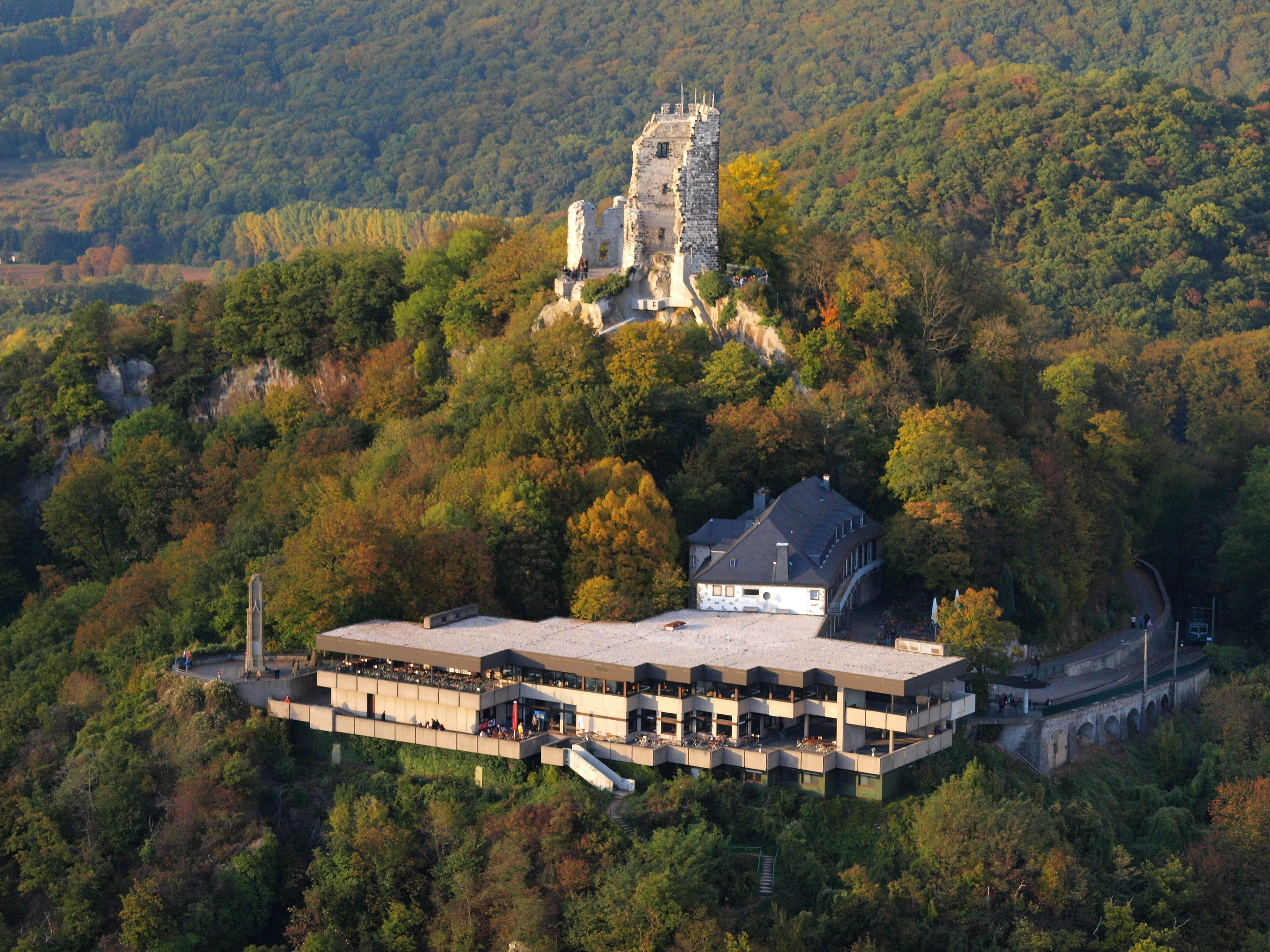 Drachenfels-Plateau und Burgruine, Luftaufnahme mit Restaurantgebäude aus den 1970er-Jahren (2011 abgebrochen)